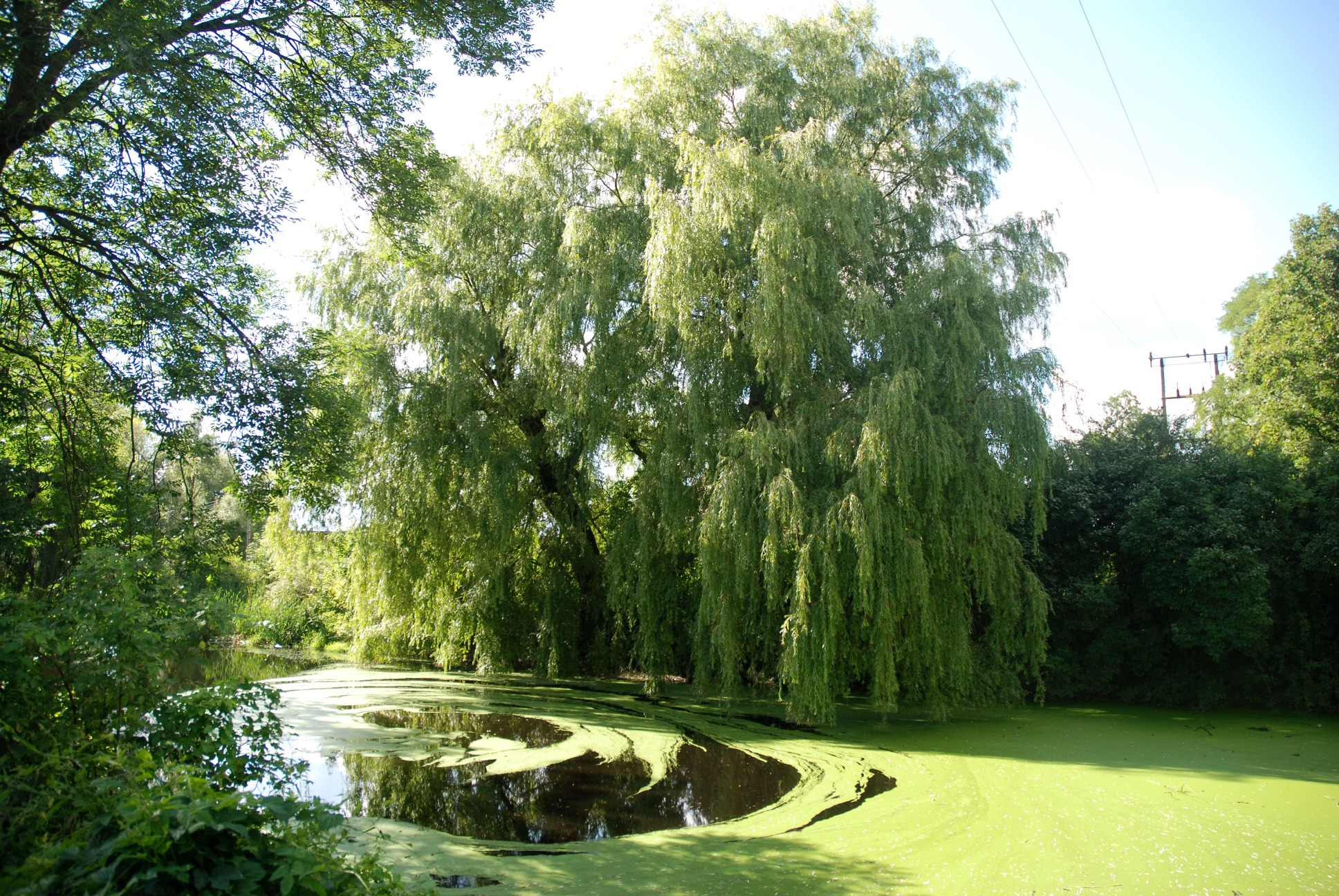 Bruczków - park w zespole pałacowym